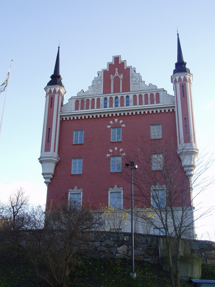 Amiralitetshuset, Skeppsholmen, Stockholm